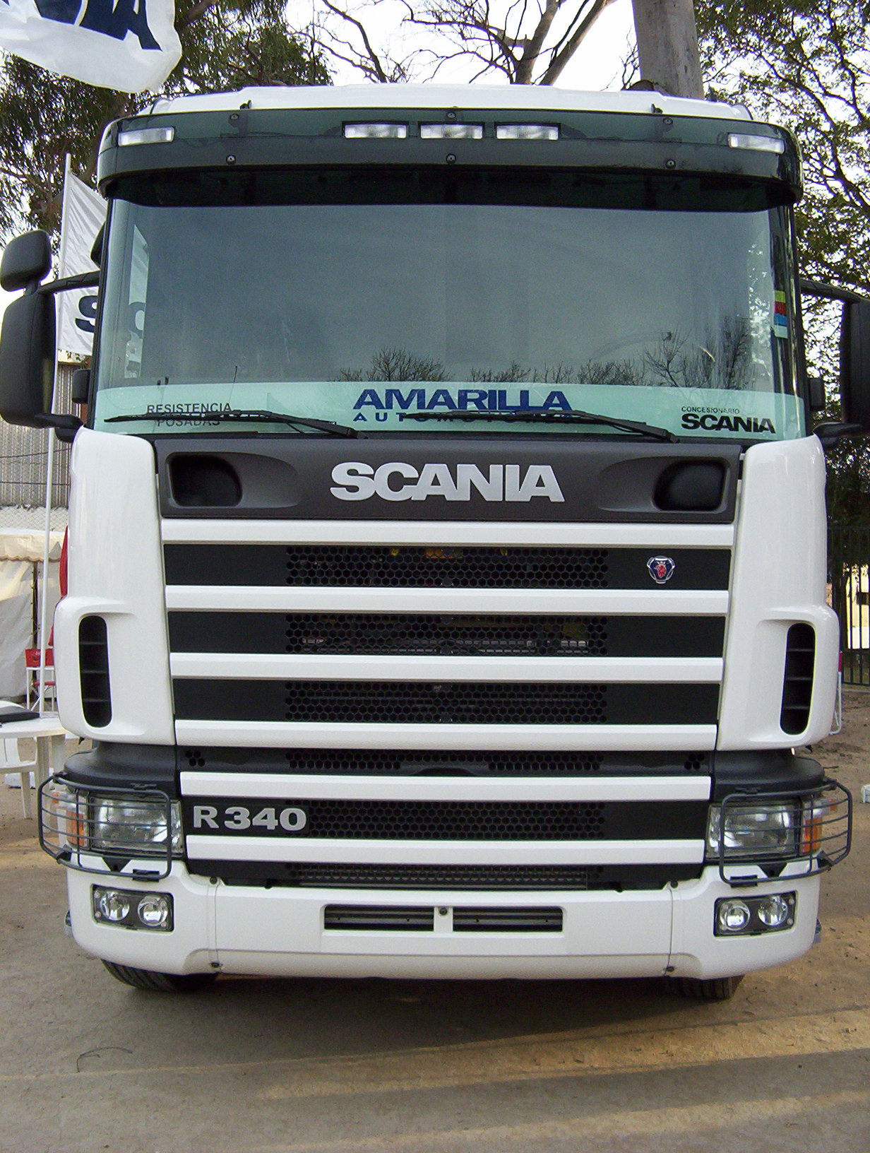 merienda familiar en la playa